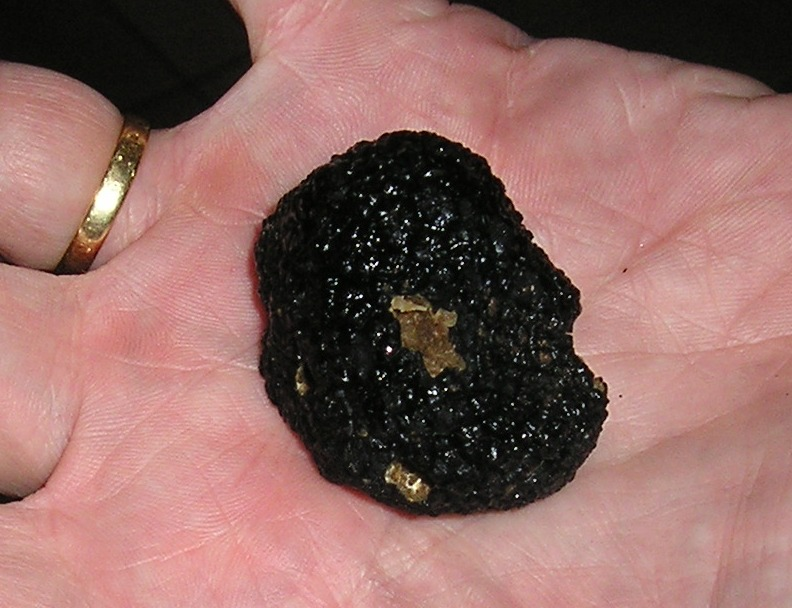 Truffe de Bourgogne